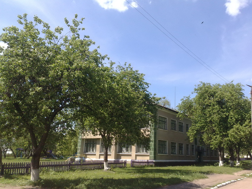 Дитячий садок